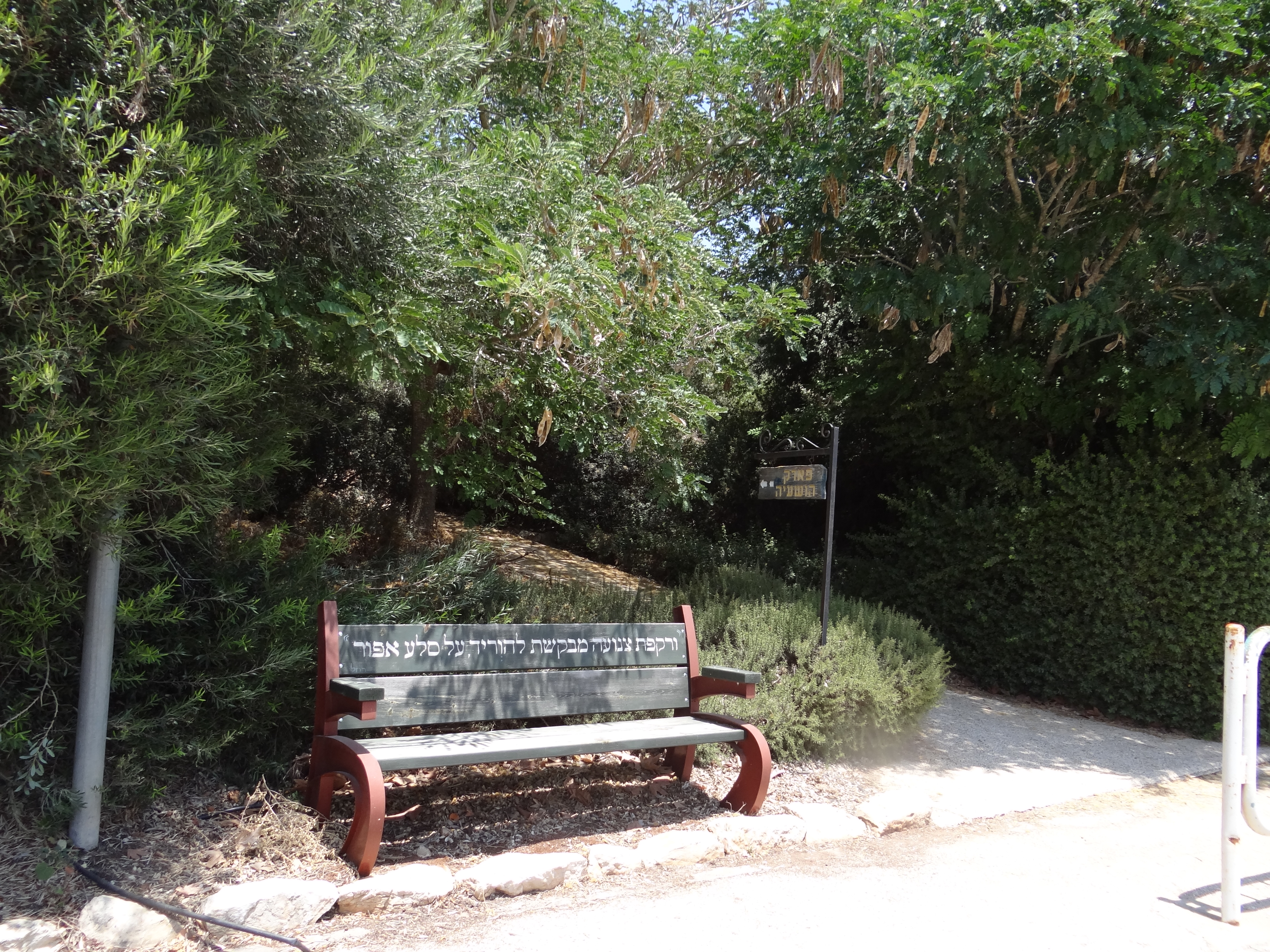 הושעיה הוא יישוב קהילתי דתי בגליל התחתון, 6 ק"מ צפונית לנצרת, בתחום השיפוט של המועצה האזורית עמק יזרעאל. הכניסה לפארק הושעיה במרכז היישוב